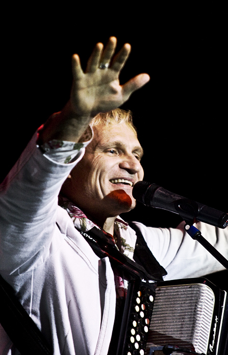 Олег Скрипка на концерте НАУ 25